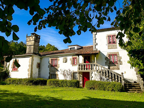 El Pazo de Lobagueiras es una edificación del siglo XVIII, de estilo barroco.